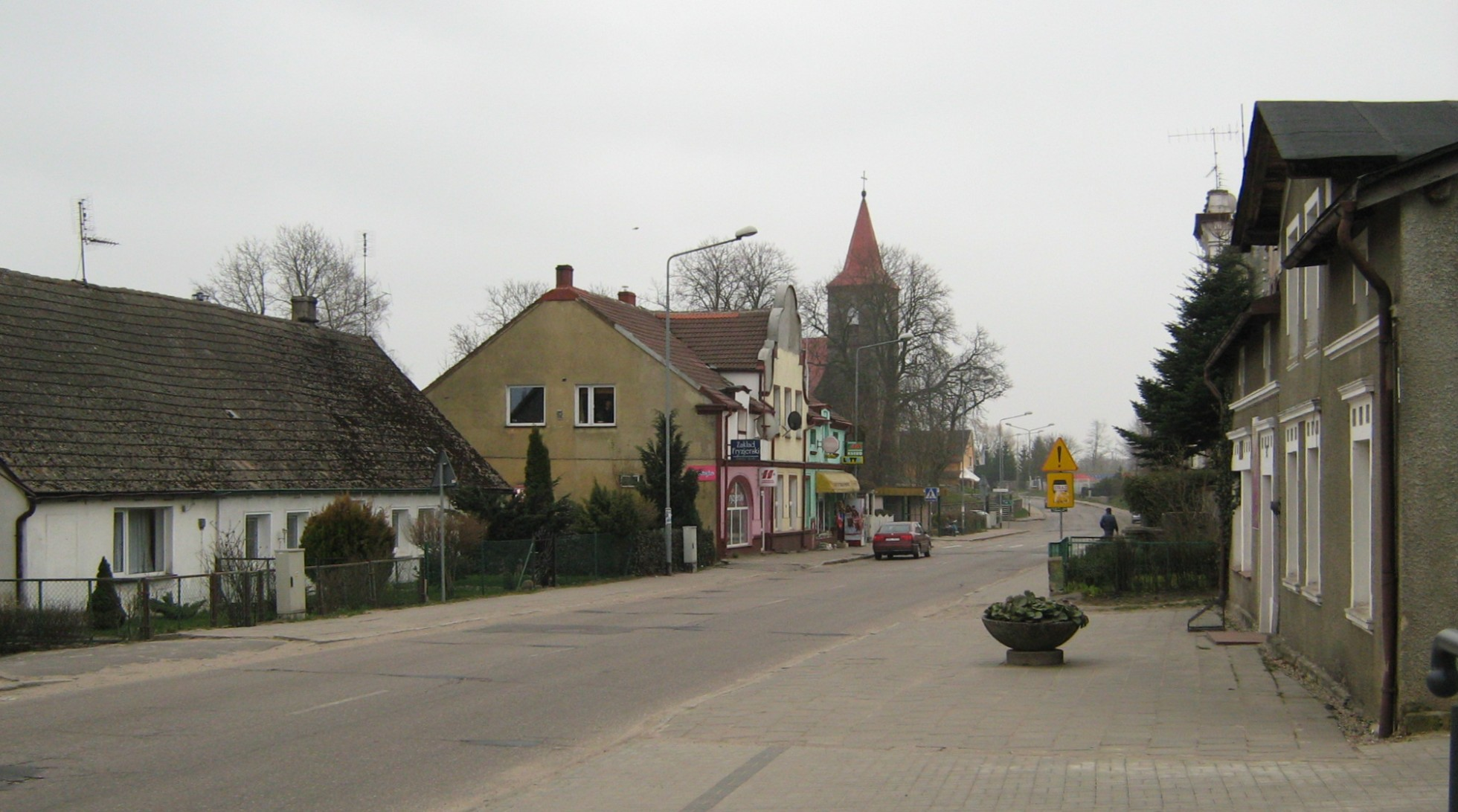 Gościno (pow. kołobrzeski). Ulica IV Dywizji Wojska Polskiego, widok sprzed banku w kierunku południowym.